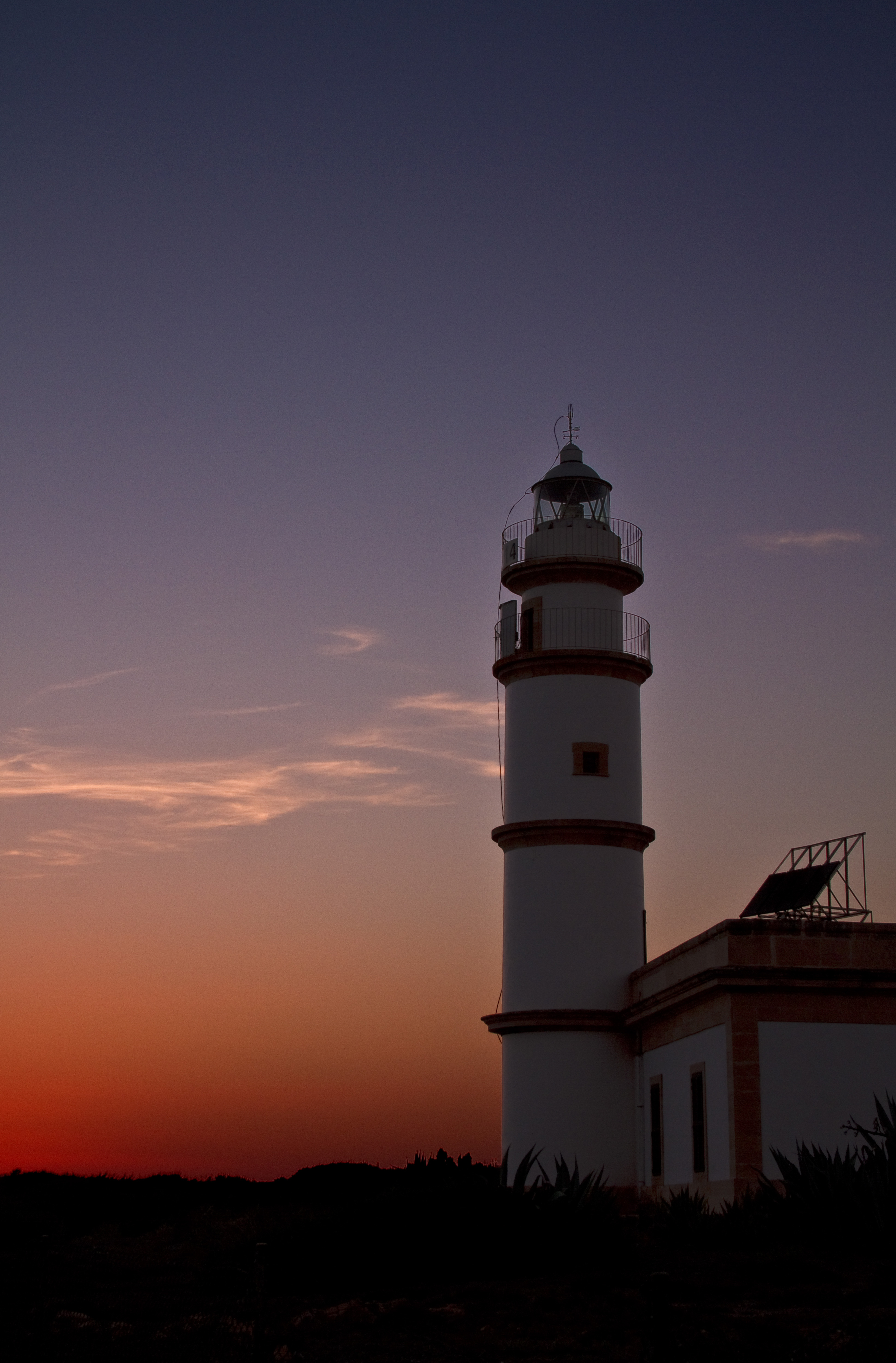 far del cap de ses salines